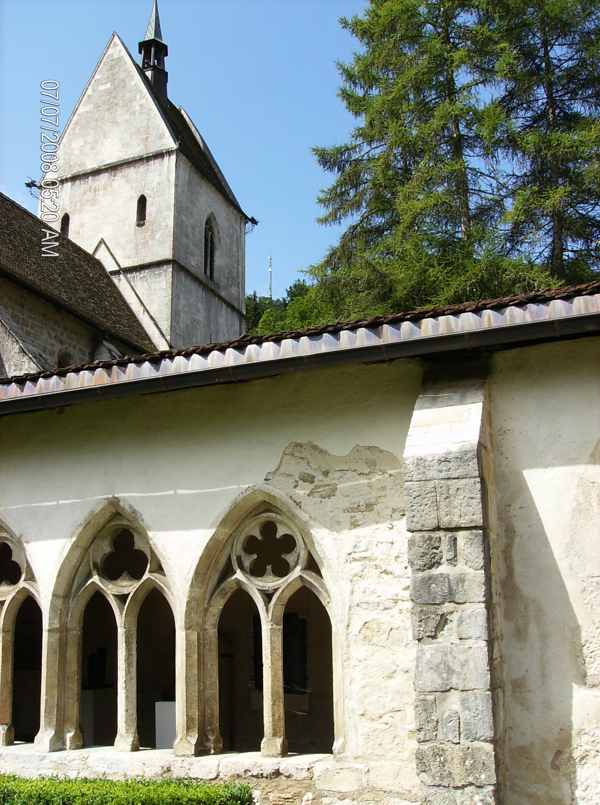 Cloître et clocher de la collégiale.